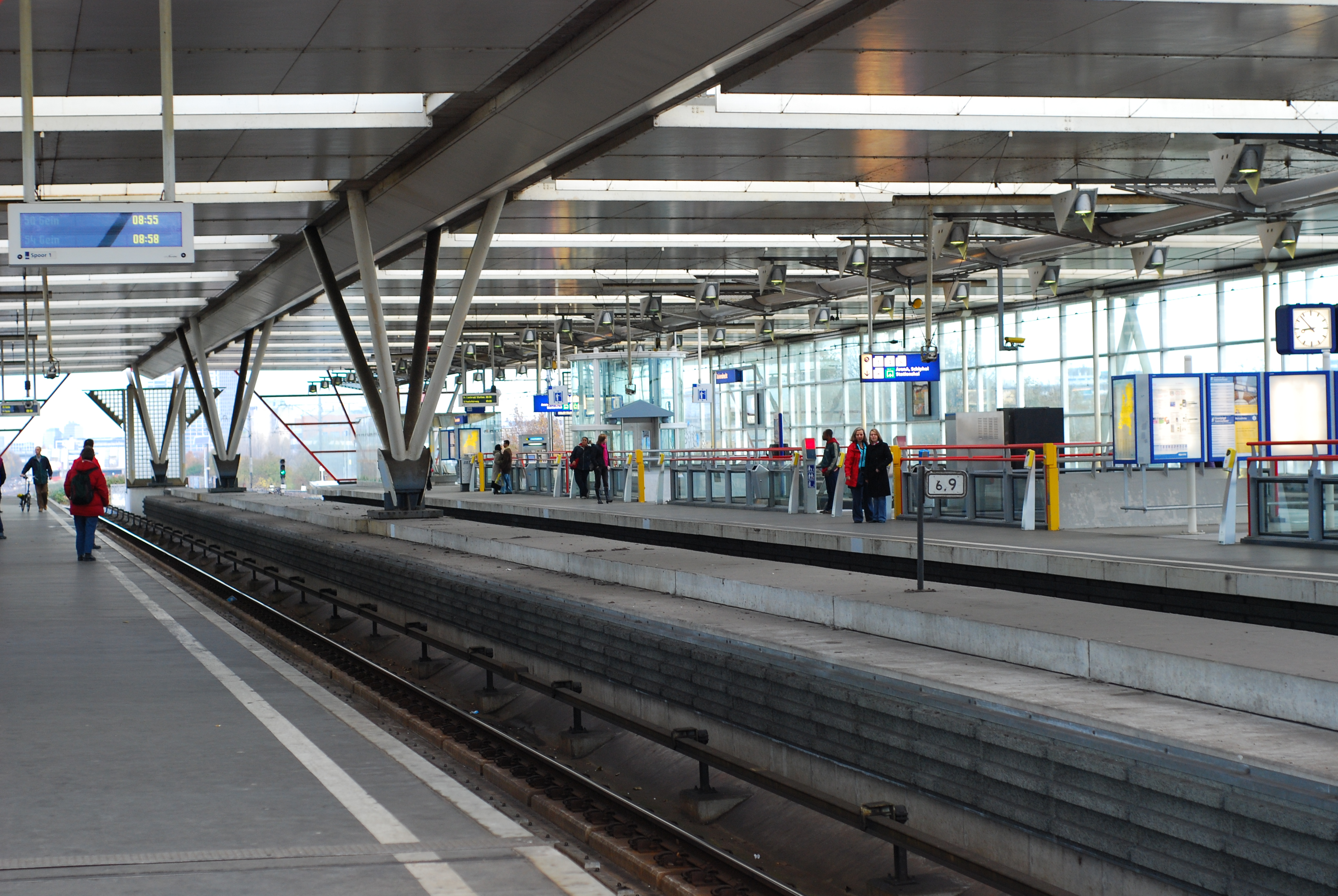 Binnenzijde bovenste platform station Duivendrecht. Zichtbaar is het tweerichtingsverkeer van de metrolijn. Licensing Duivendrecht